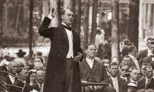 Joseph Franklin Rutherford donne un discours en 1919, peu de temps après sa libération